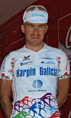 David García Dapena. Karpin-Galicia, Euskal Bizikleta 2008